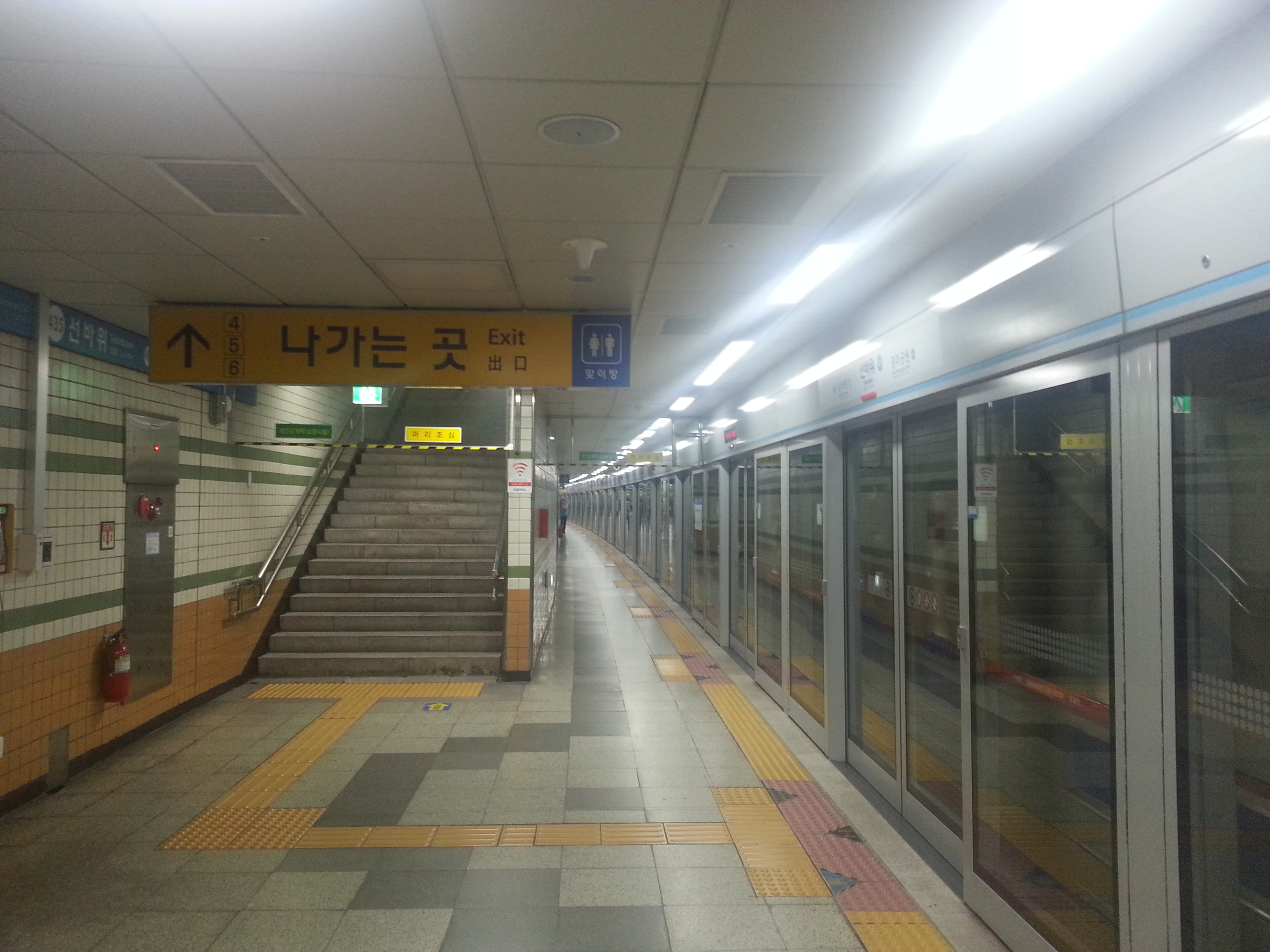 선바위역 1번 승강장